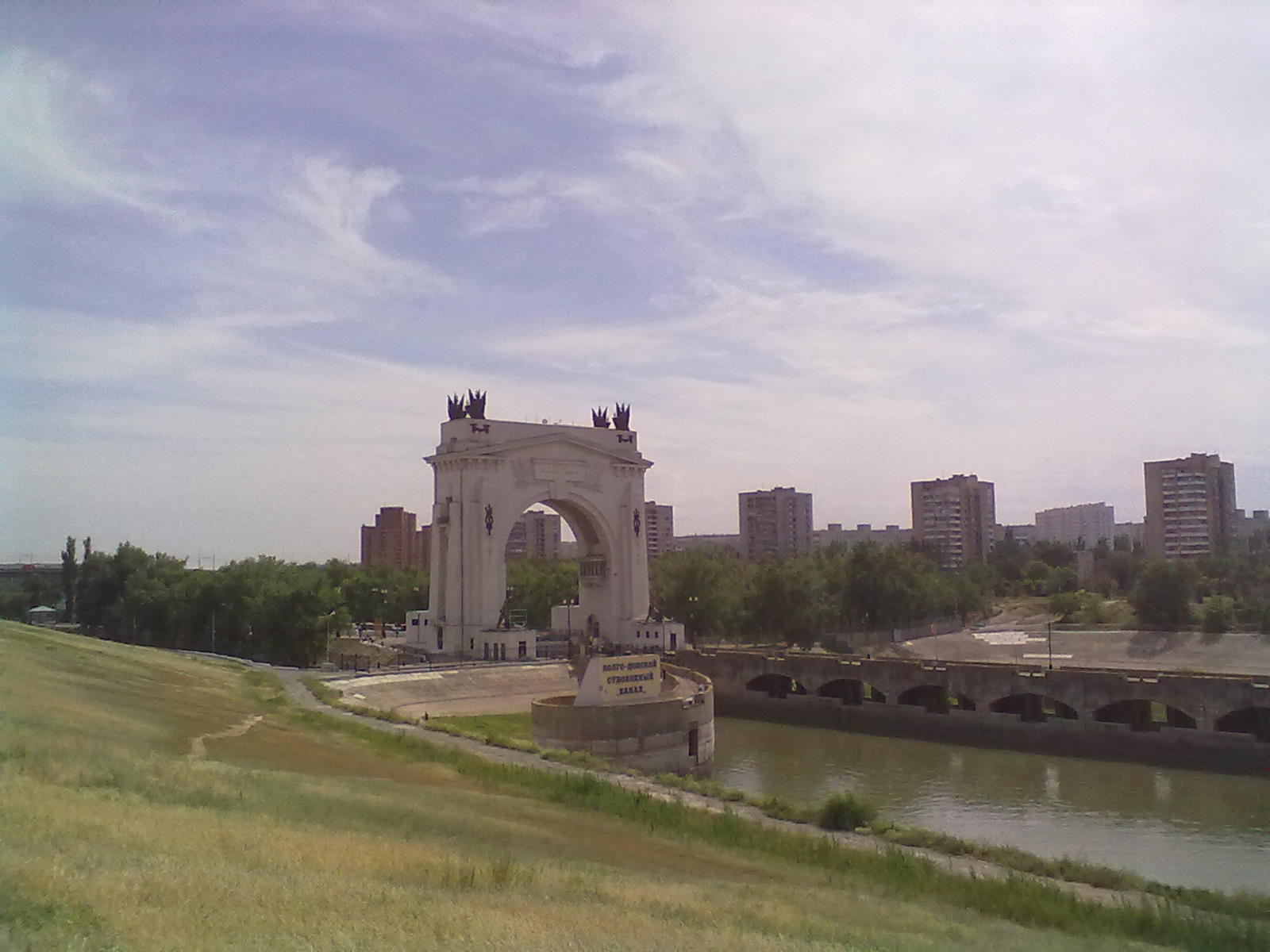 Шлюз № 1 Волго-Донского судоходного канала им. В.И. Ленина. Волгоград.